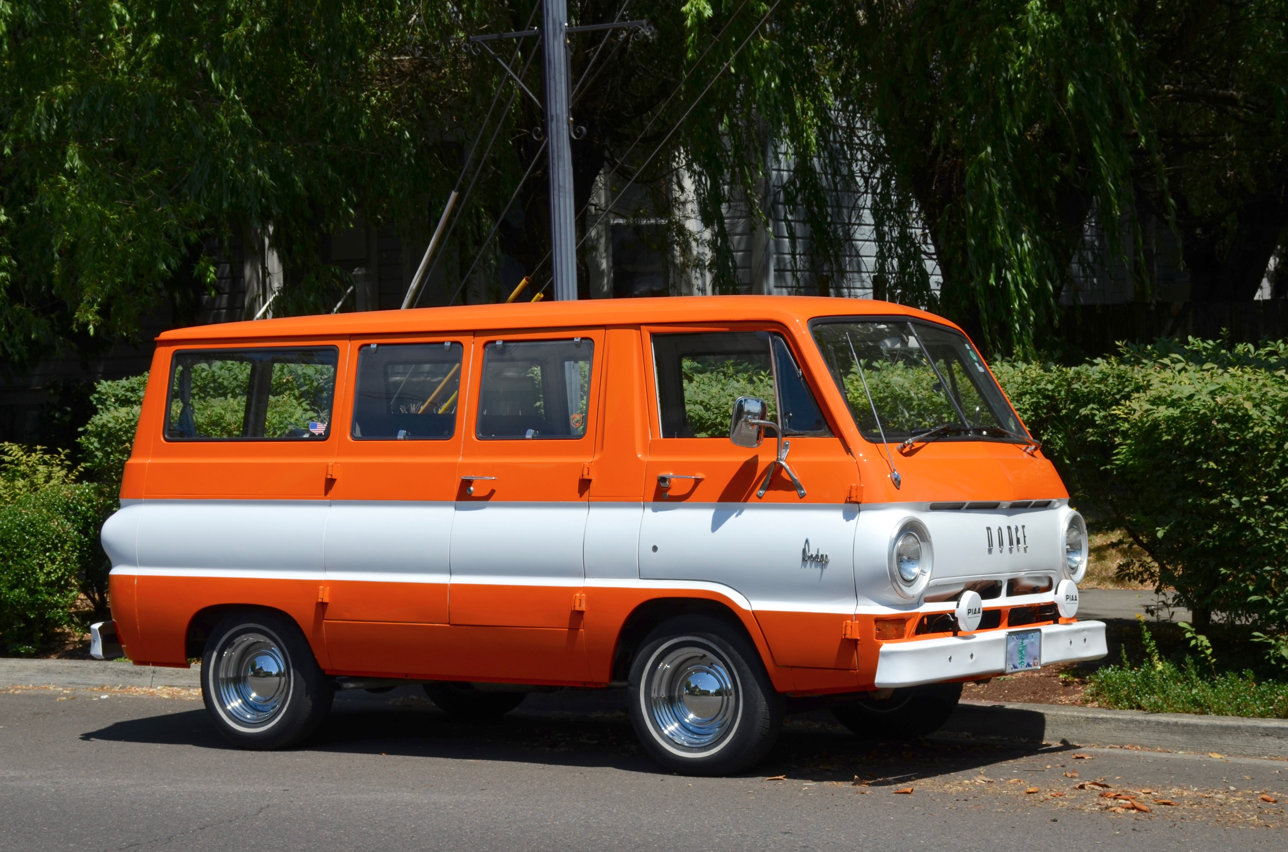 A Dodge A100 van in Oregon.